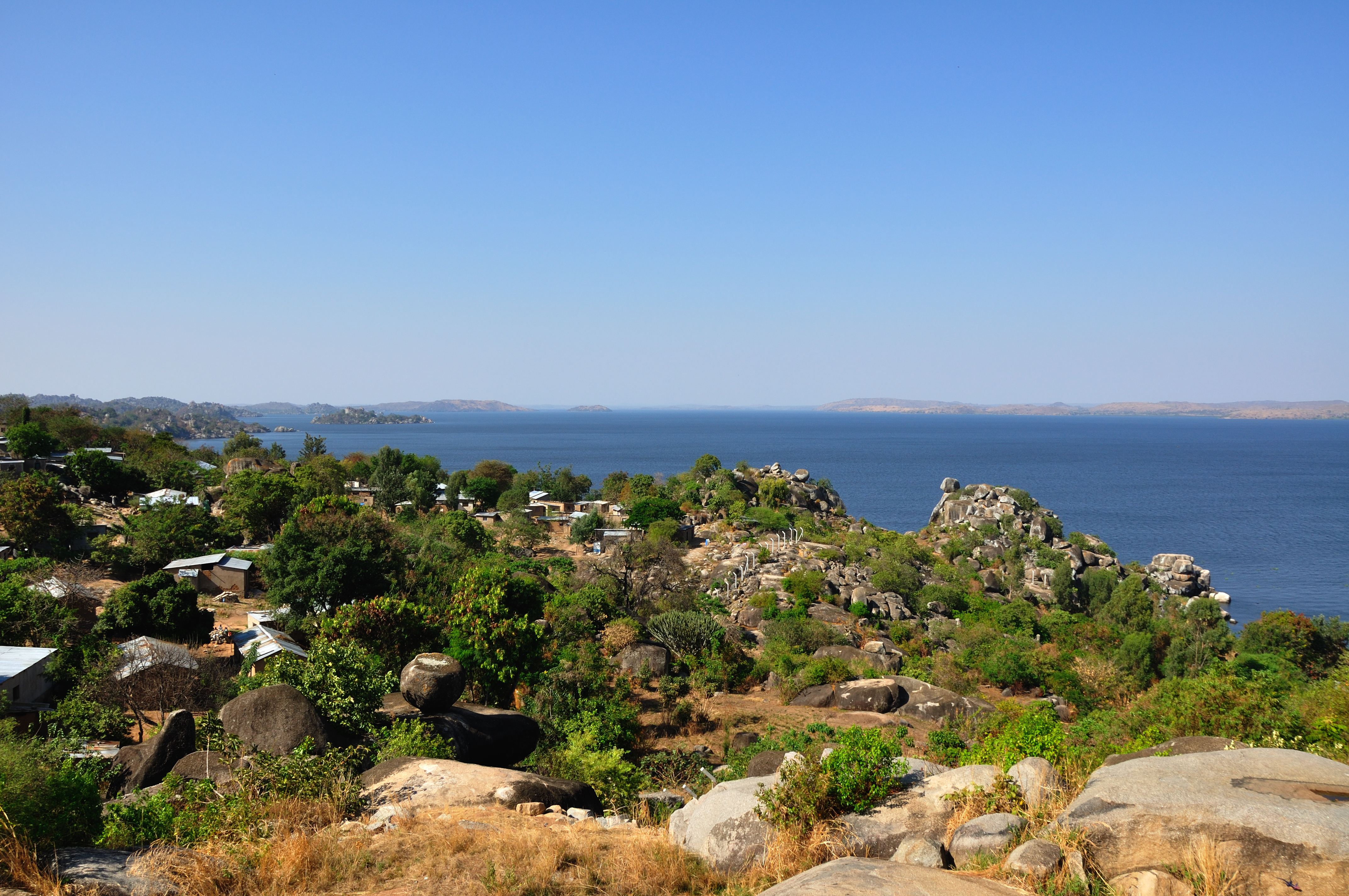 Tanzania, views in Mwanza